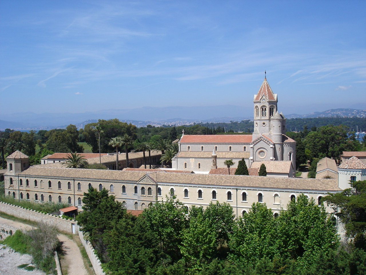 Une vue de l'abbaye de Lérins sur l'ile Saint-Honorat (Alpes-Maritimes) depuis la forteresse.